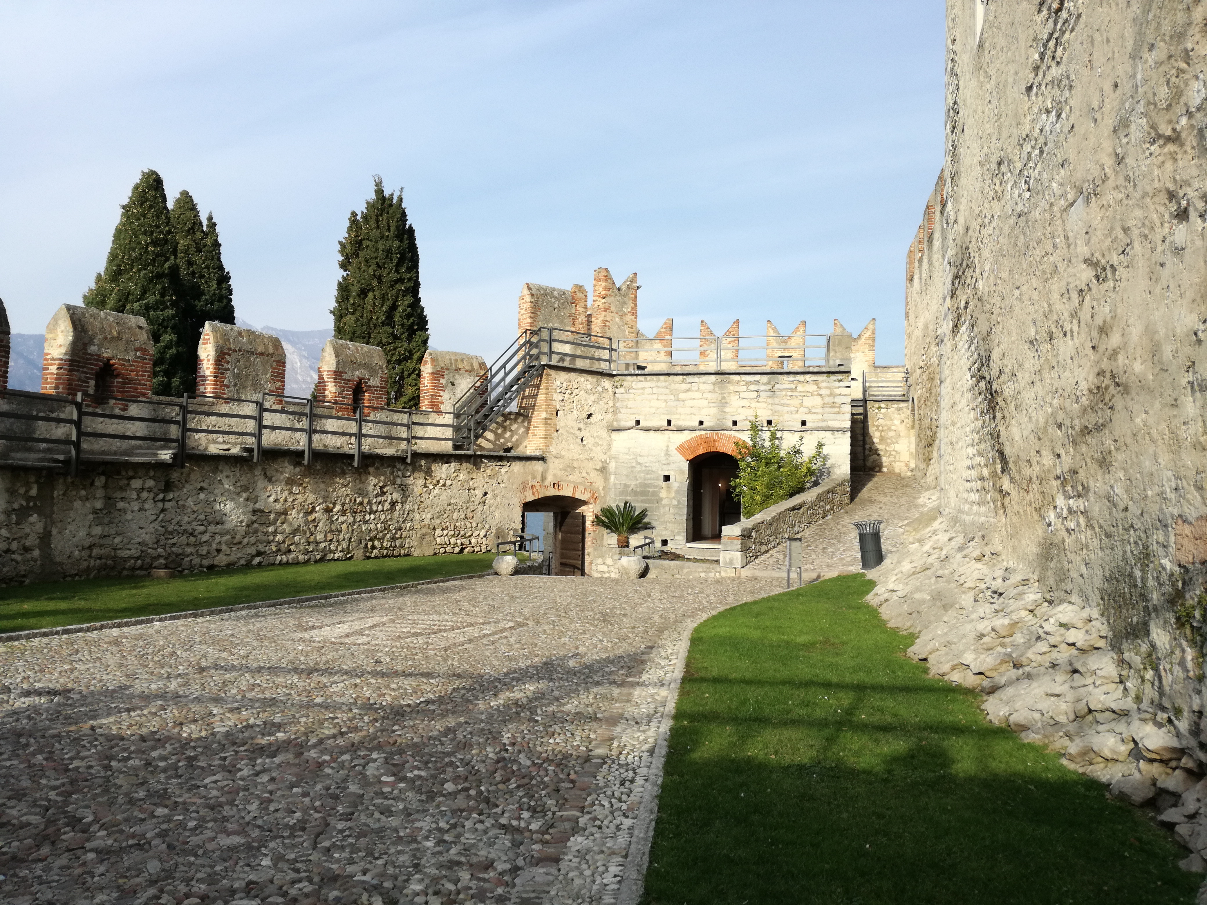 Scaligerburg Malcesine mittlerer Innenhof